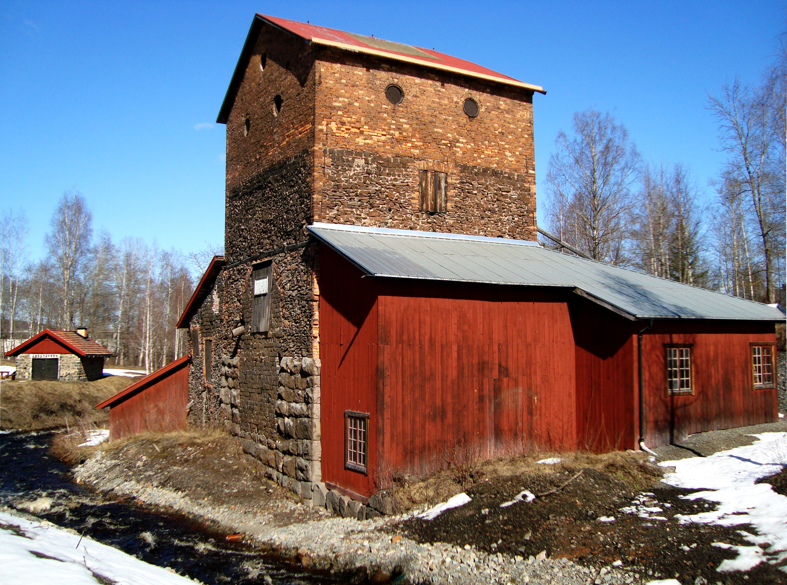 Ruinerna av Flatenbergs hytta, utanför Smedjebacken, Sverige